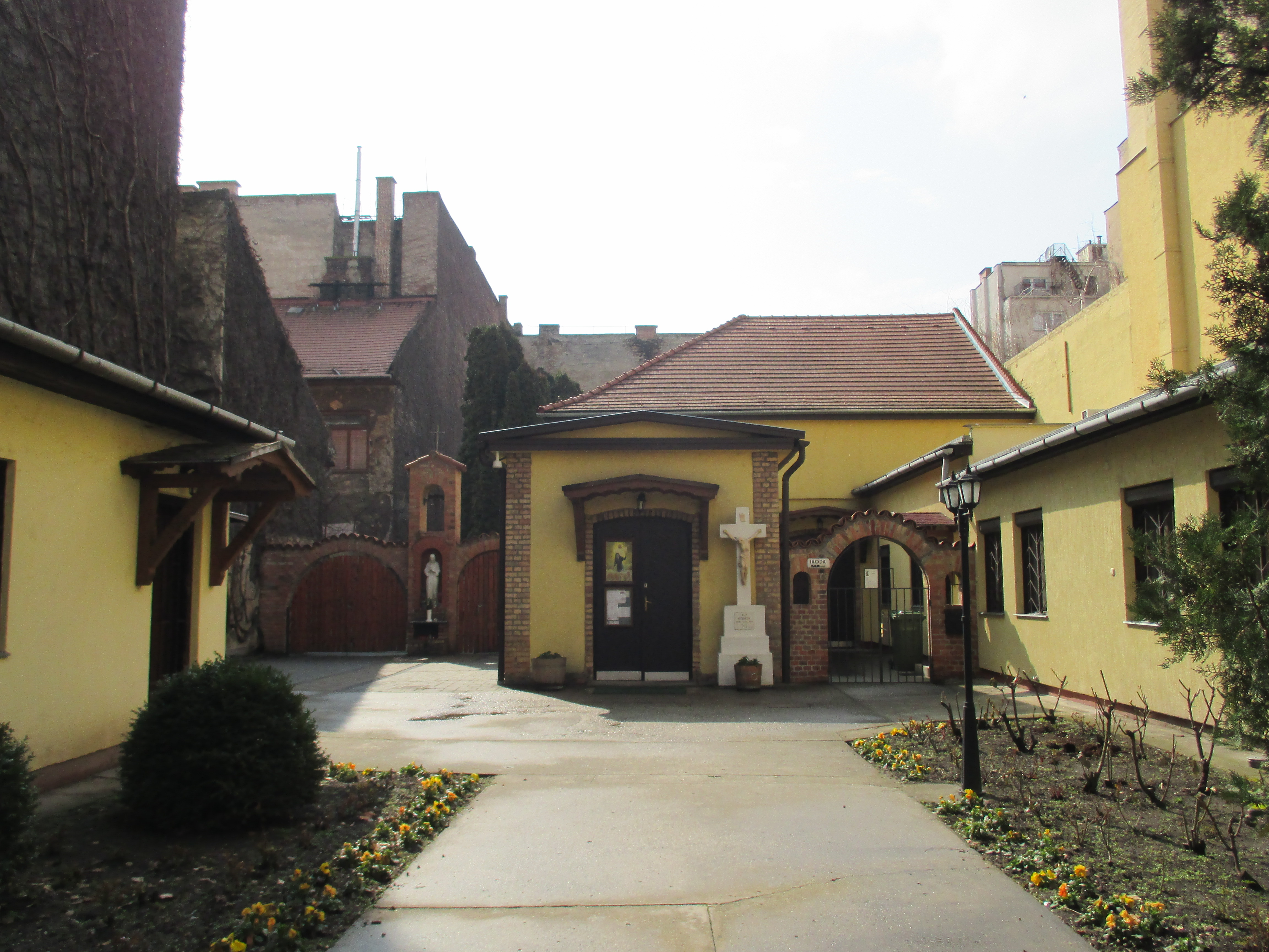 A Szent Rita-kápolna a Kun utcában, Budapest VIII.